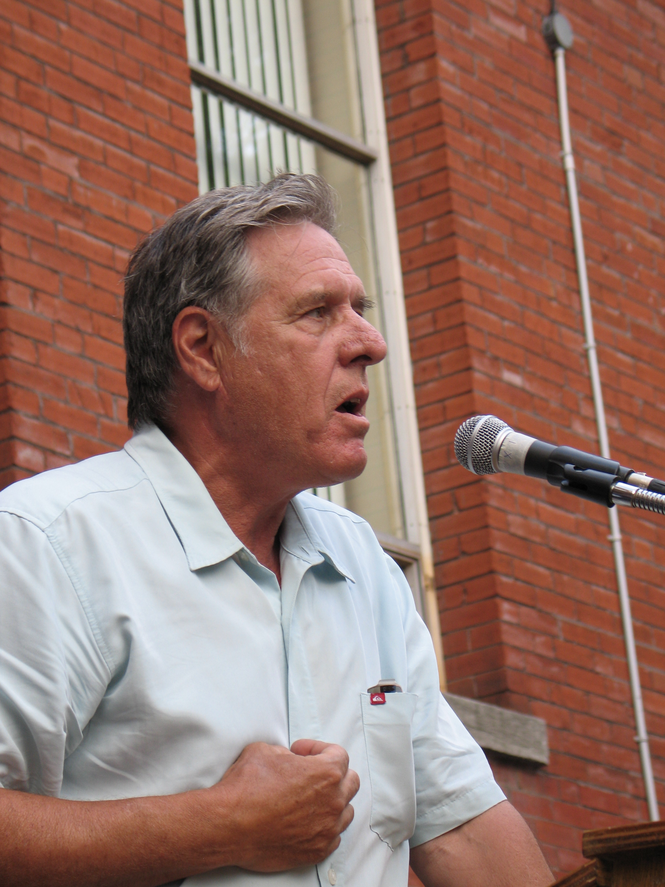 L'acteur, syndicaliste et député québécois Pierre Curzi, lors d'une manifestation célébrant les 30 ans de la Charte de la langue française, le 26 août 2007.